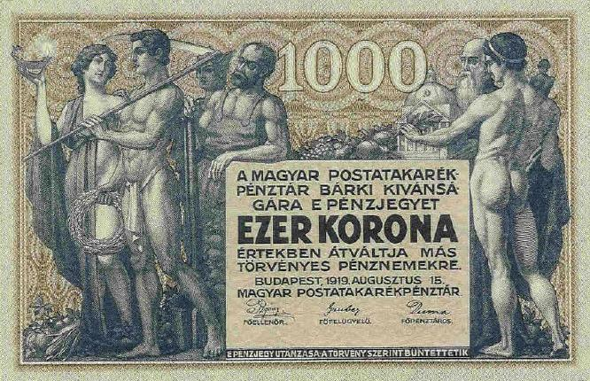 1000 Hungarian korona (1919) Postal Savings Bank note, printer's proof - obverse